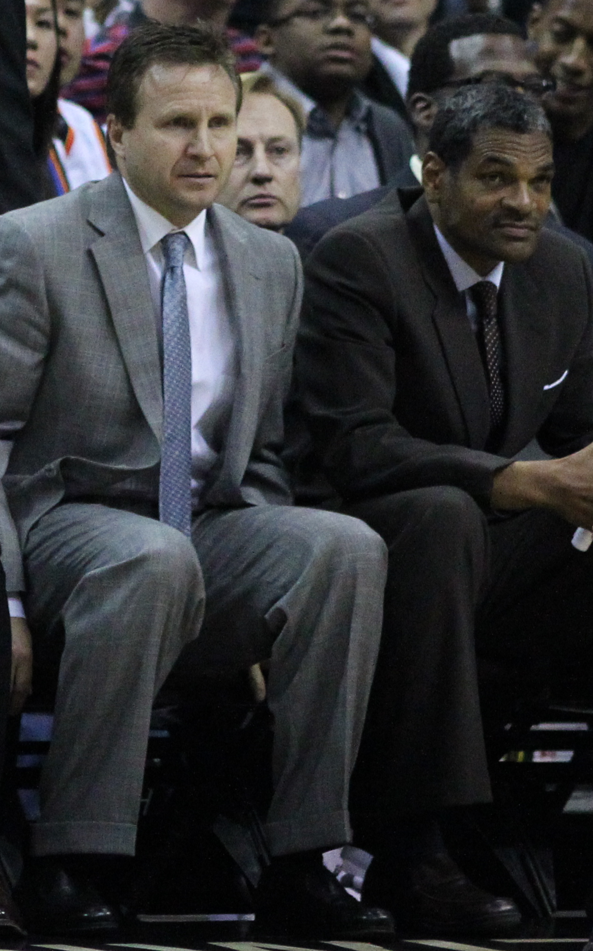 Wizards v/s Thunder 03/14/11